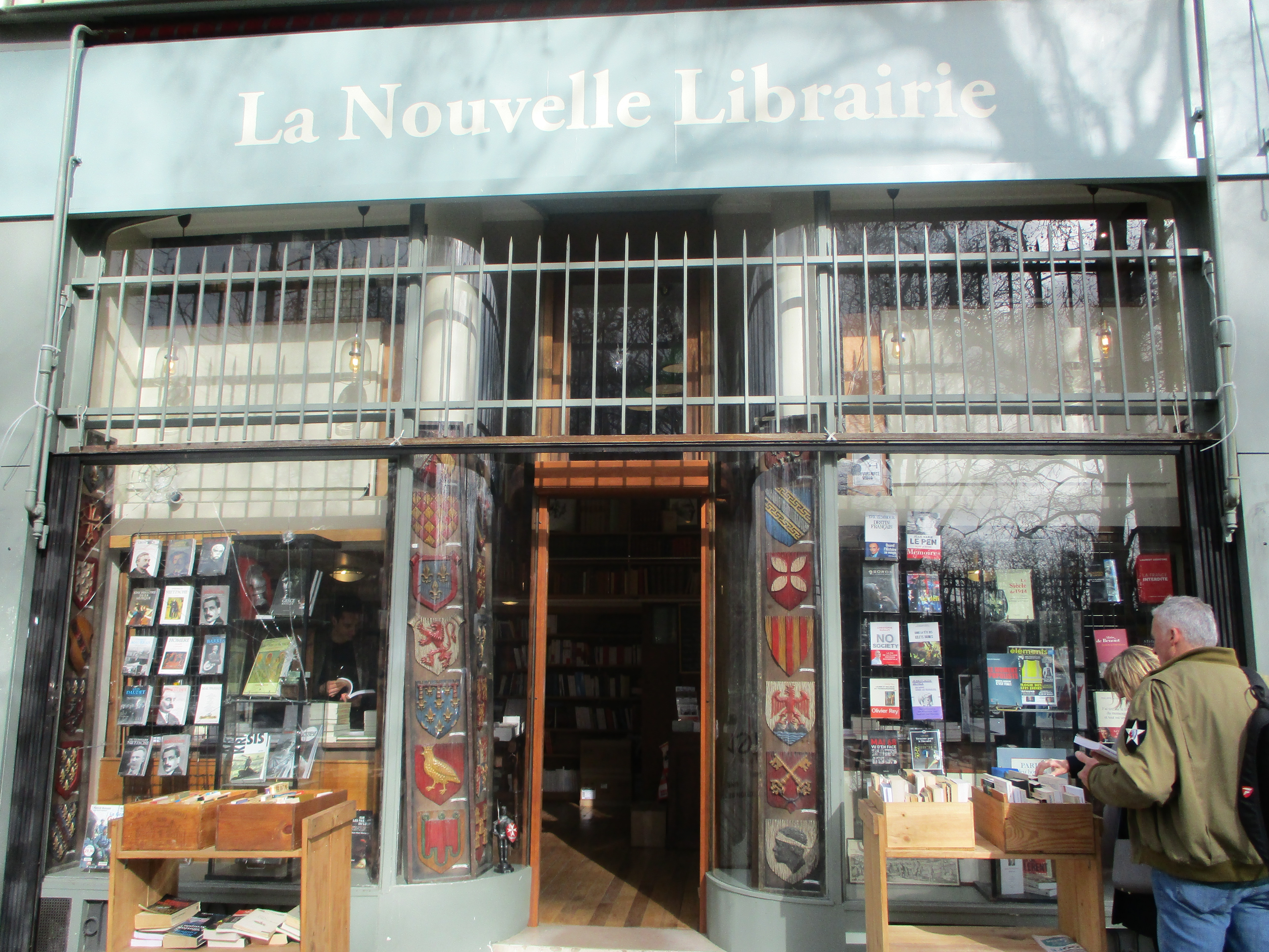 La Nouvelle Librairie, rue de Médicis à Paris.